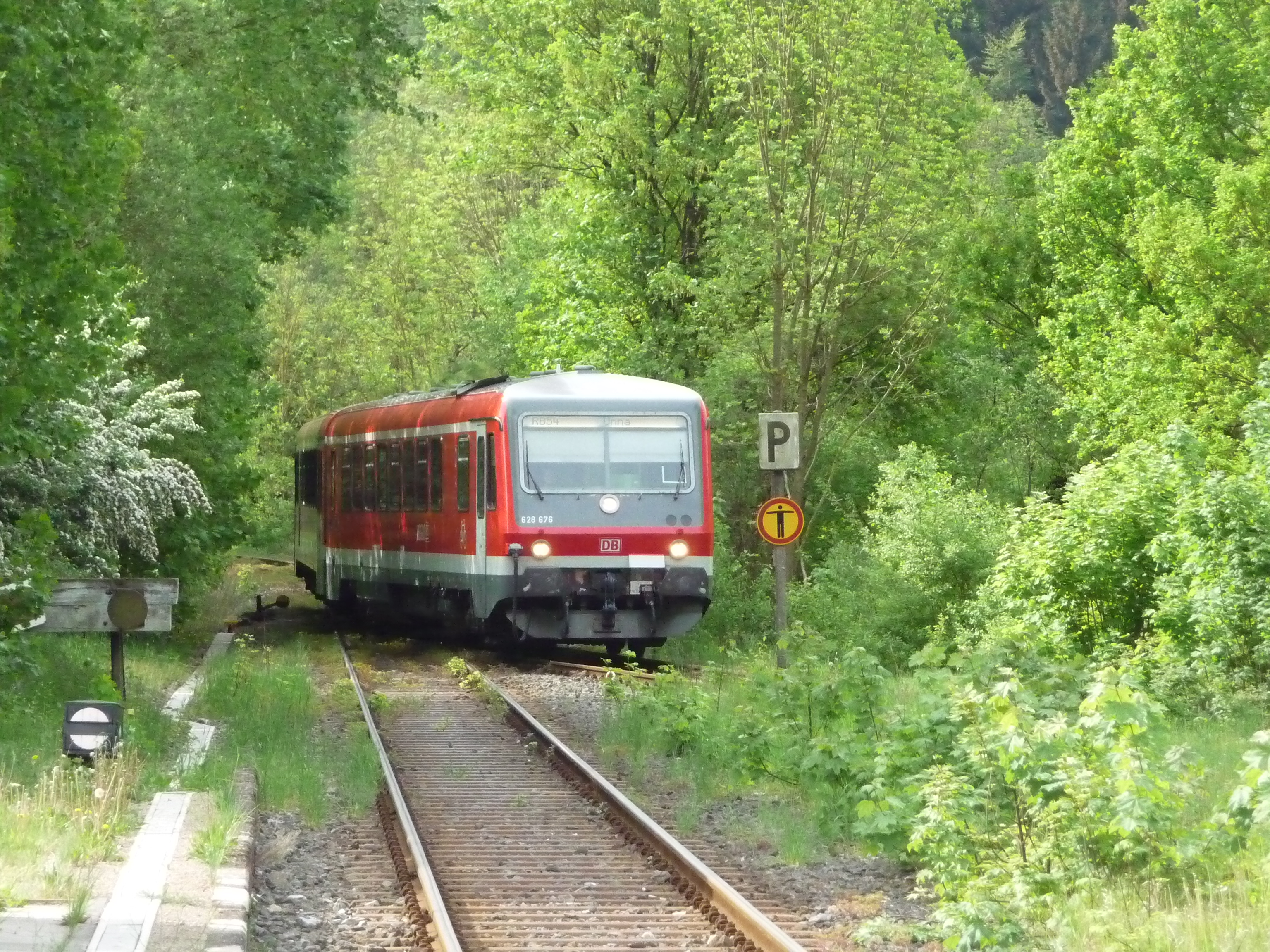 Einfahrt eines 628 in den Bahnhof Binolen an der Hönnetalbahn am 10. Mai 2011.